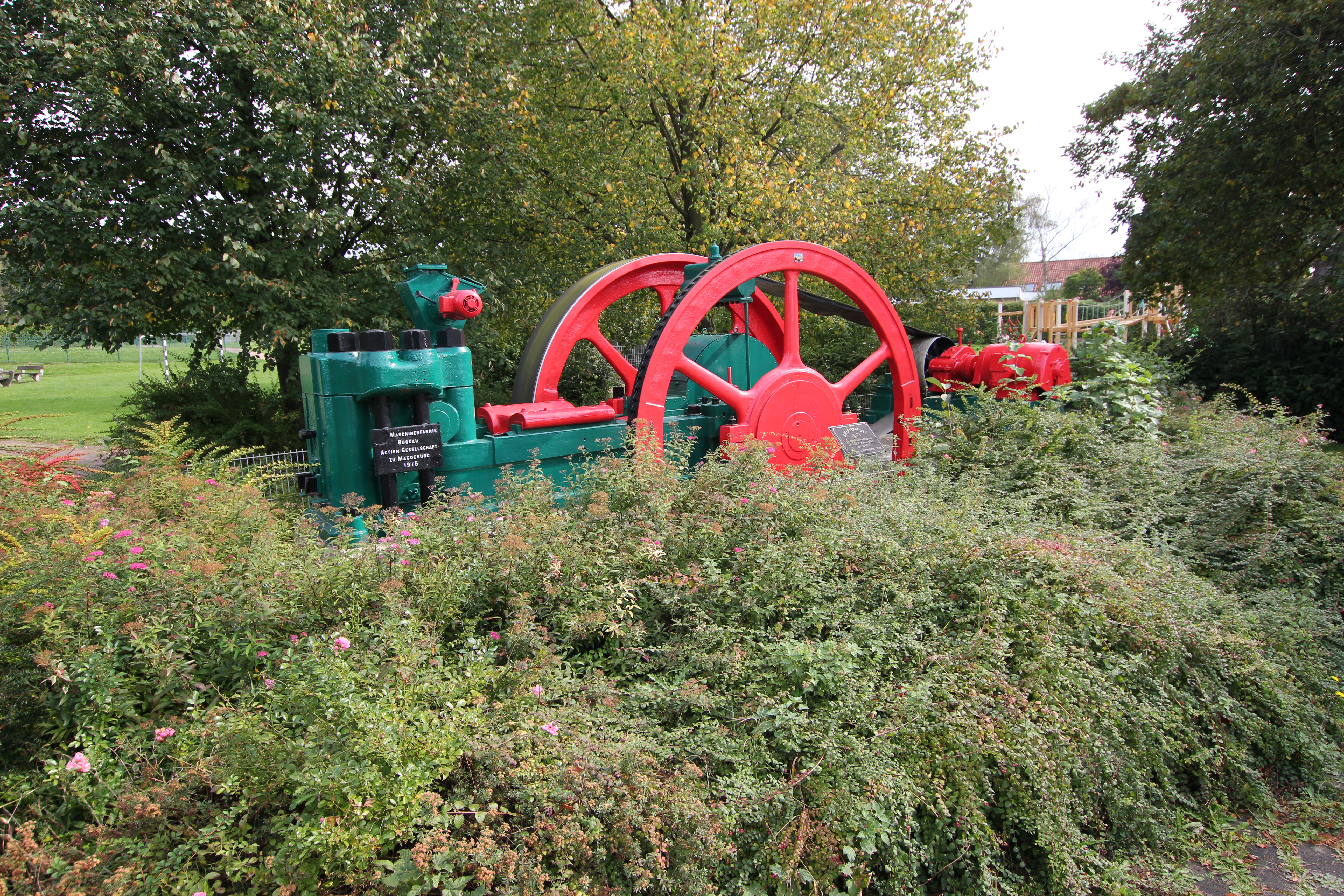 Brikettpresse Ville I der ehemaligen Brikettfabrik Knapsack. Heutiger Standort der von der Maschinenfabrik Buckau Aktiengesellschaft zu Magdeburg im Jahr 1915 gebauten Presse ist Erftstadt-Köttingen. Die Presse hat ein Gewicht von 45 Tonnen und erreichte eine Leistung von 85 Brikett pro Minute. Sie wurde im Jahr 1988 von der Rheinbraun AG der Stadt Erftstadt gestiftet.